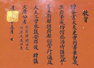 조선 후기의 성리학자, 작가 안방준의 시호 교지